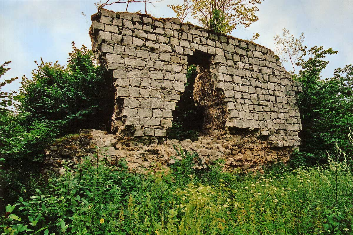 Zamek w Radłówce